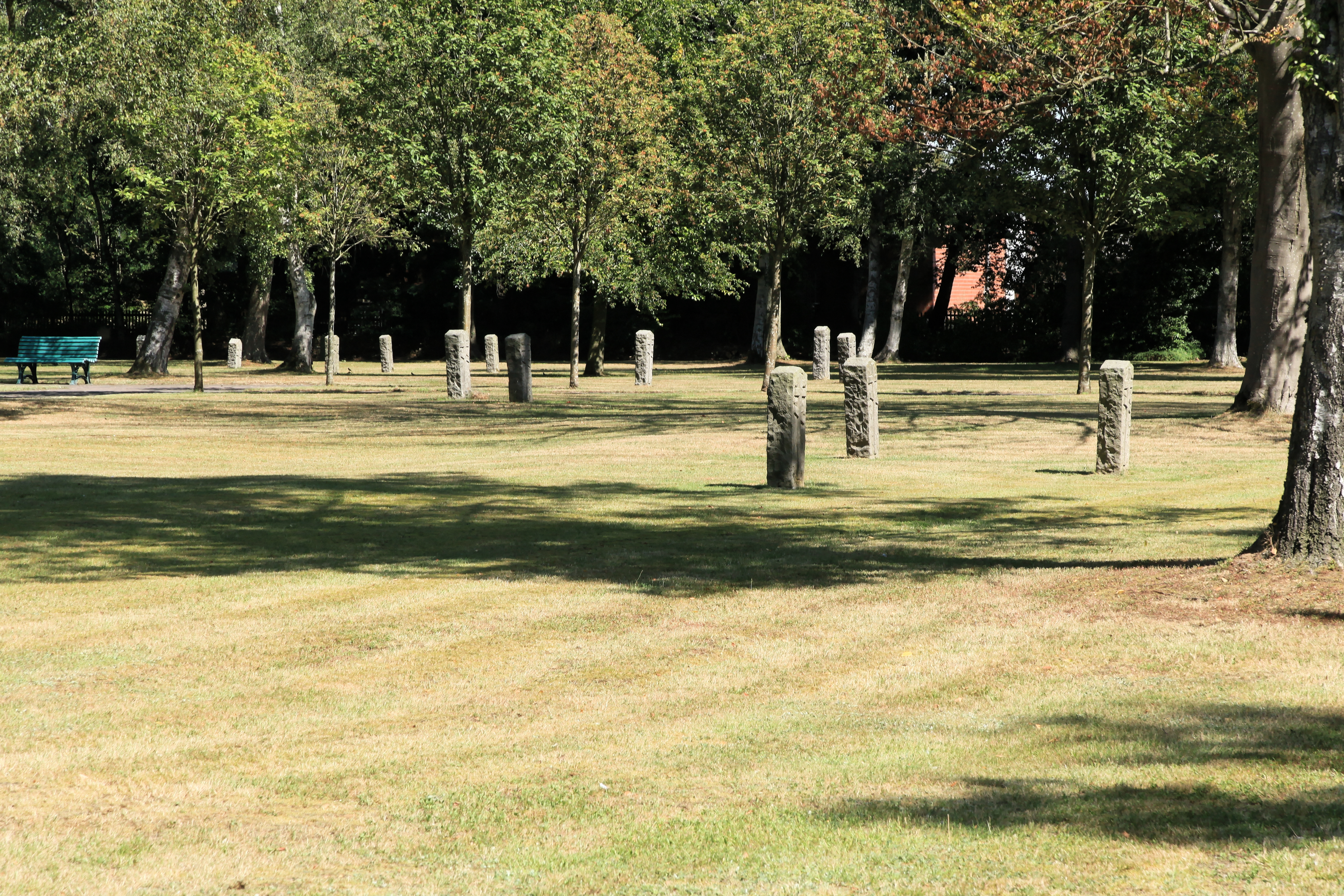 Kriegsgräberstätte Dalum, Rull in Geeste